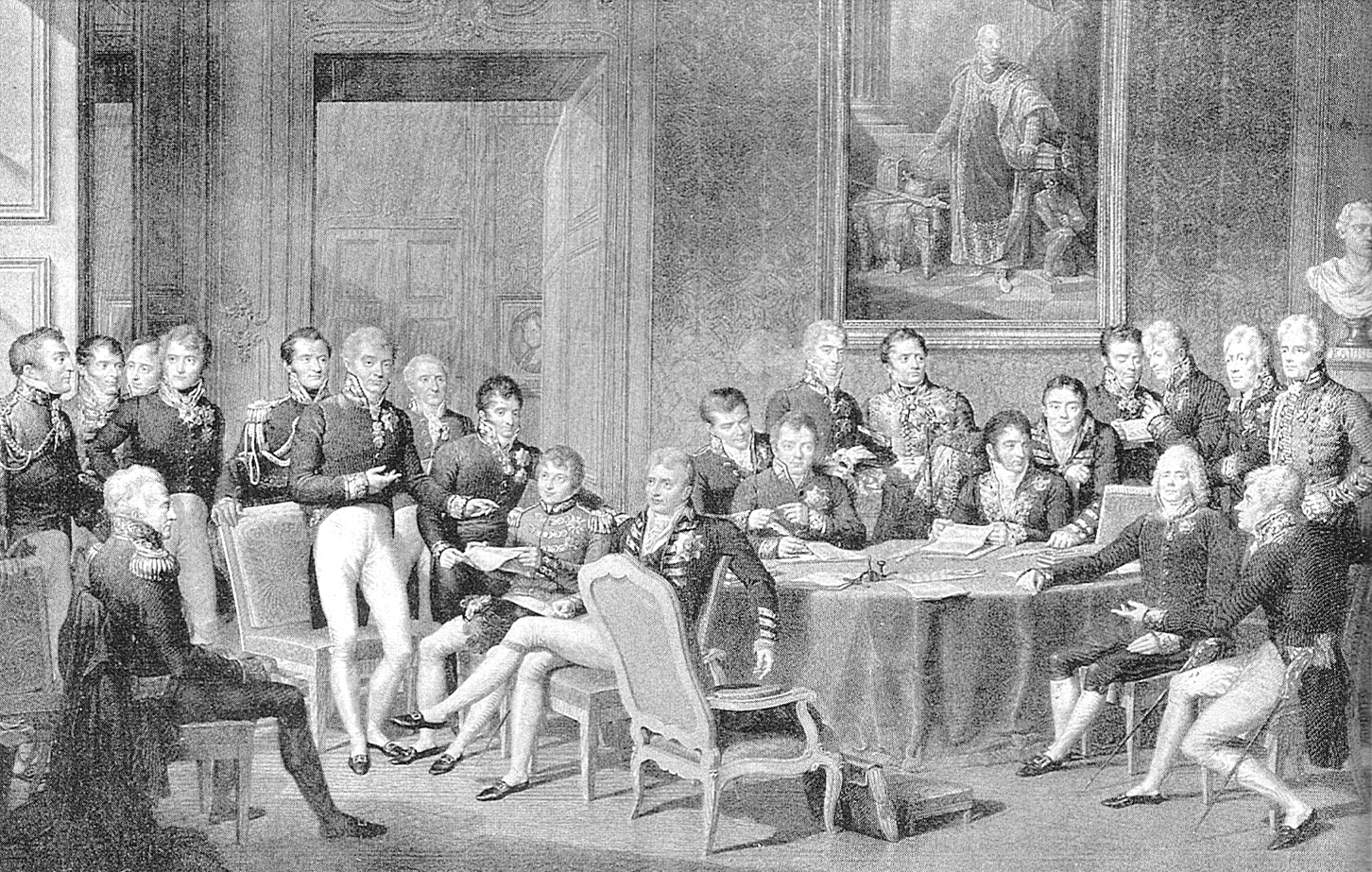 Beschreibung: Wiener Kongress